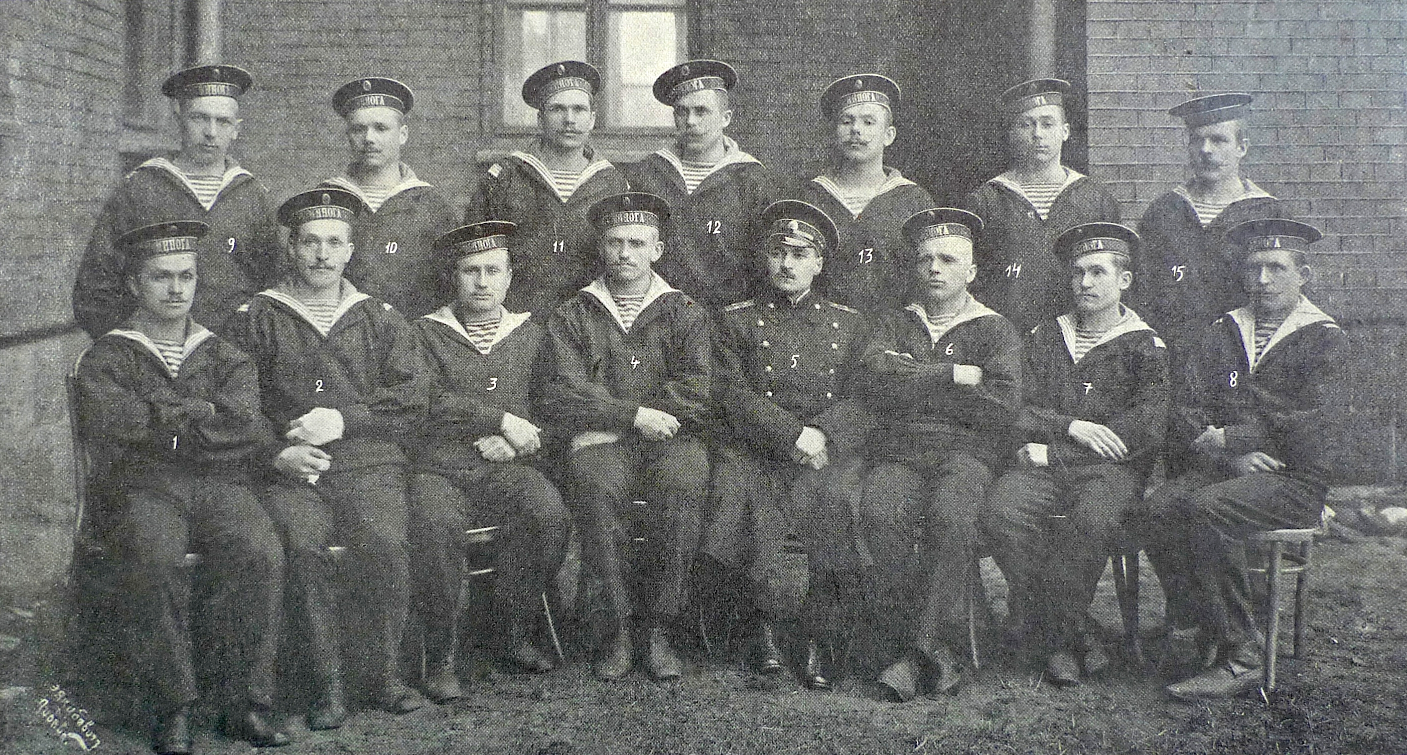 Командир и команда подводной лодки "Минога". Сидят: 1) минный машинист Бак, 2) старший минный машинный унтер-офицер Монаев, 3) электрик унтер-офицер Николаев, 4) боцман Гордњев, 5) лейтенант фон-Герсдорф, 6) рулевой унтер-офицер (2-й боцман) Лемков, 7) старший машинный унтер-офицер Толапин, 8) машинный унтер-офицер Сигунов. Стоят: 9) машинный унтер-офицер Янсон, 10) минный машинист Крючков, 11) моторный унтер-офицер Мясников, 12) электрик боцманмат Обремский, 13) моторист Лялин, 14) электрик унтер-офицер Христофоров, 15) электрик унтер-офицер Назаревский.